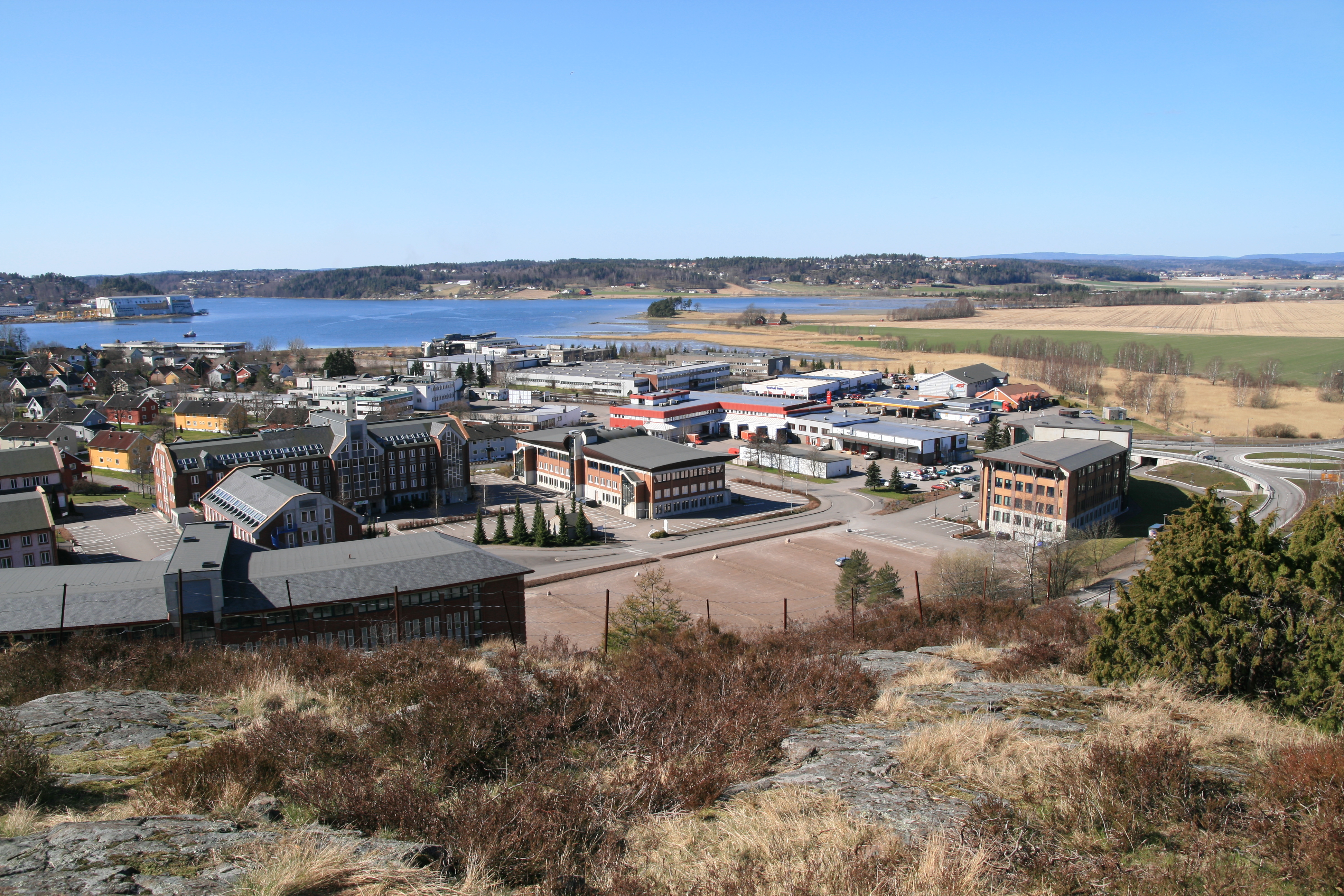 Utsikt fra Frodeåsen mot Byfjorden. Trehusbebyggelsen nord for Slottsfjellet sees midt på bildet og den siste rest av industri sees ytterst på Kaldneset i øvre venstre billedkant. --- Another view of Tønsberg Byfjorden from Frodeåsen.